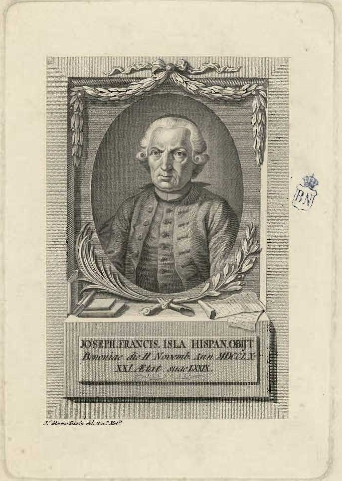 Retrato de José Francisco de Isla, grabado calcográfico por Juan Moreno de Tejada, Biblioteca Nacional de España